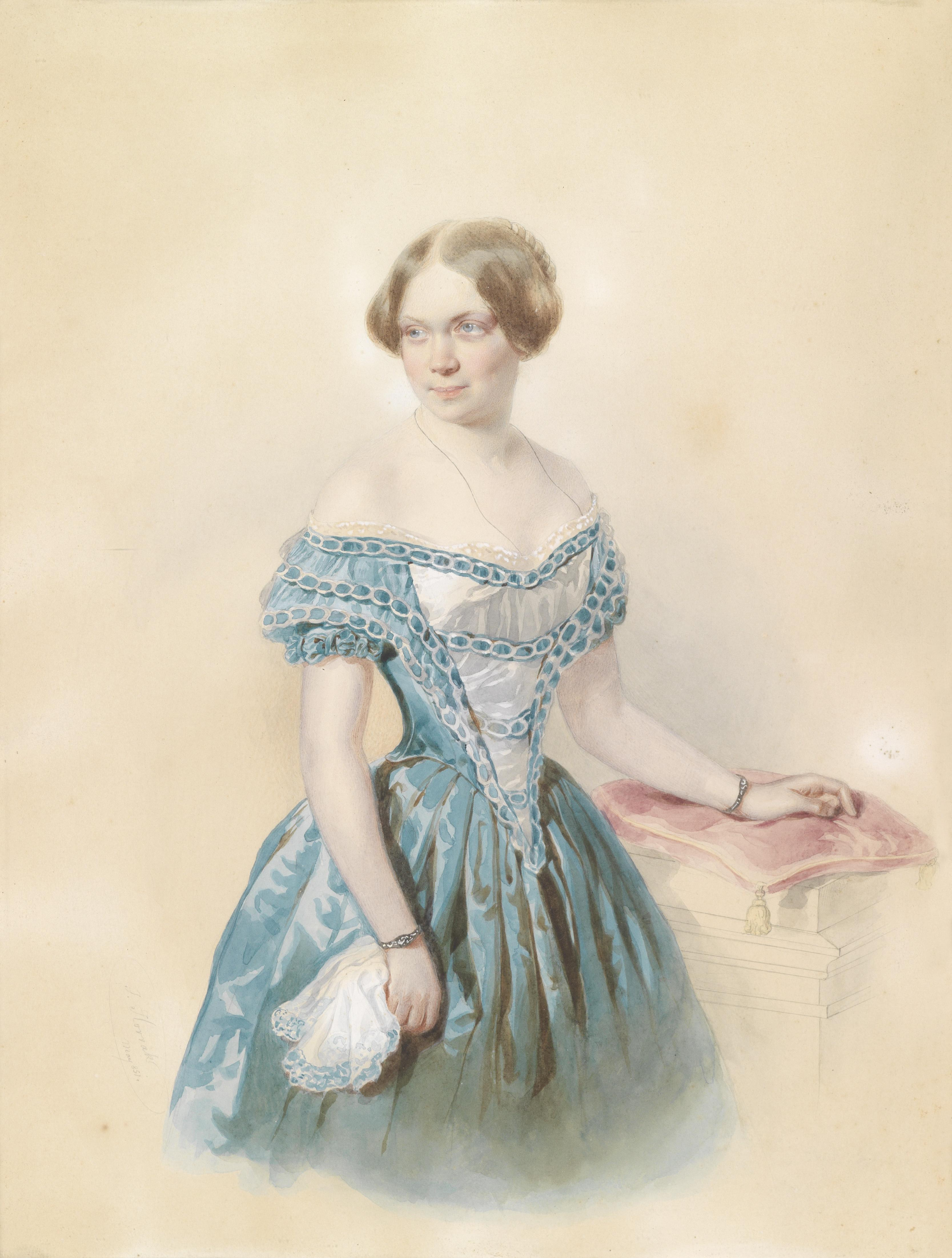 Bildnis einer jungen Frau in blauem Kleid, laut Überlieferung die junge Marie von Ebner Eschenbach, signiert und datiert J. Horrak, May (1)851, Aquarell auf Papier, 36 x 27 cm